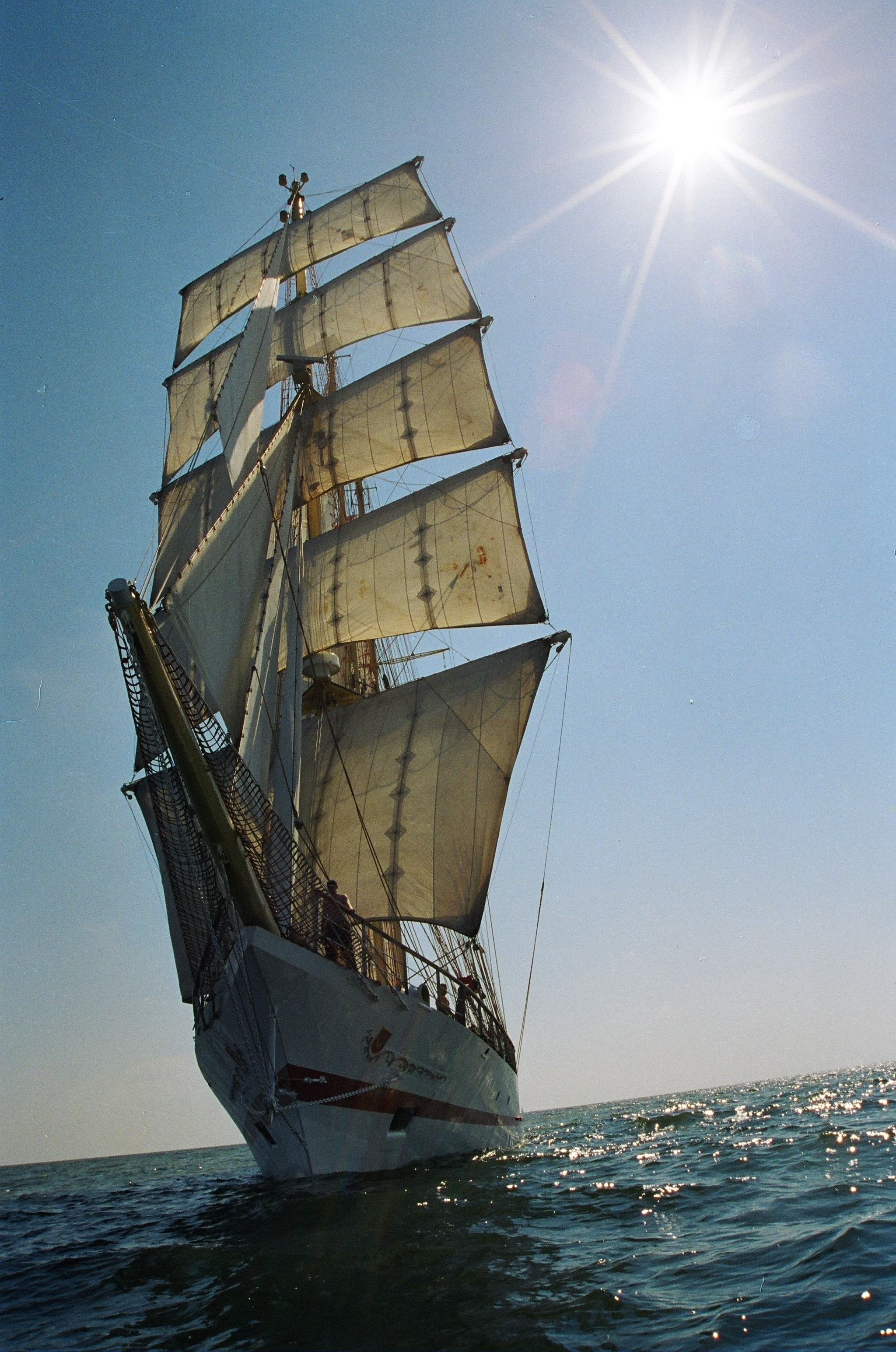 Dziób ORP Iskra.